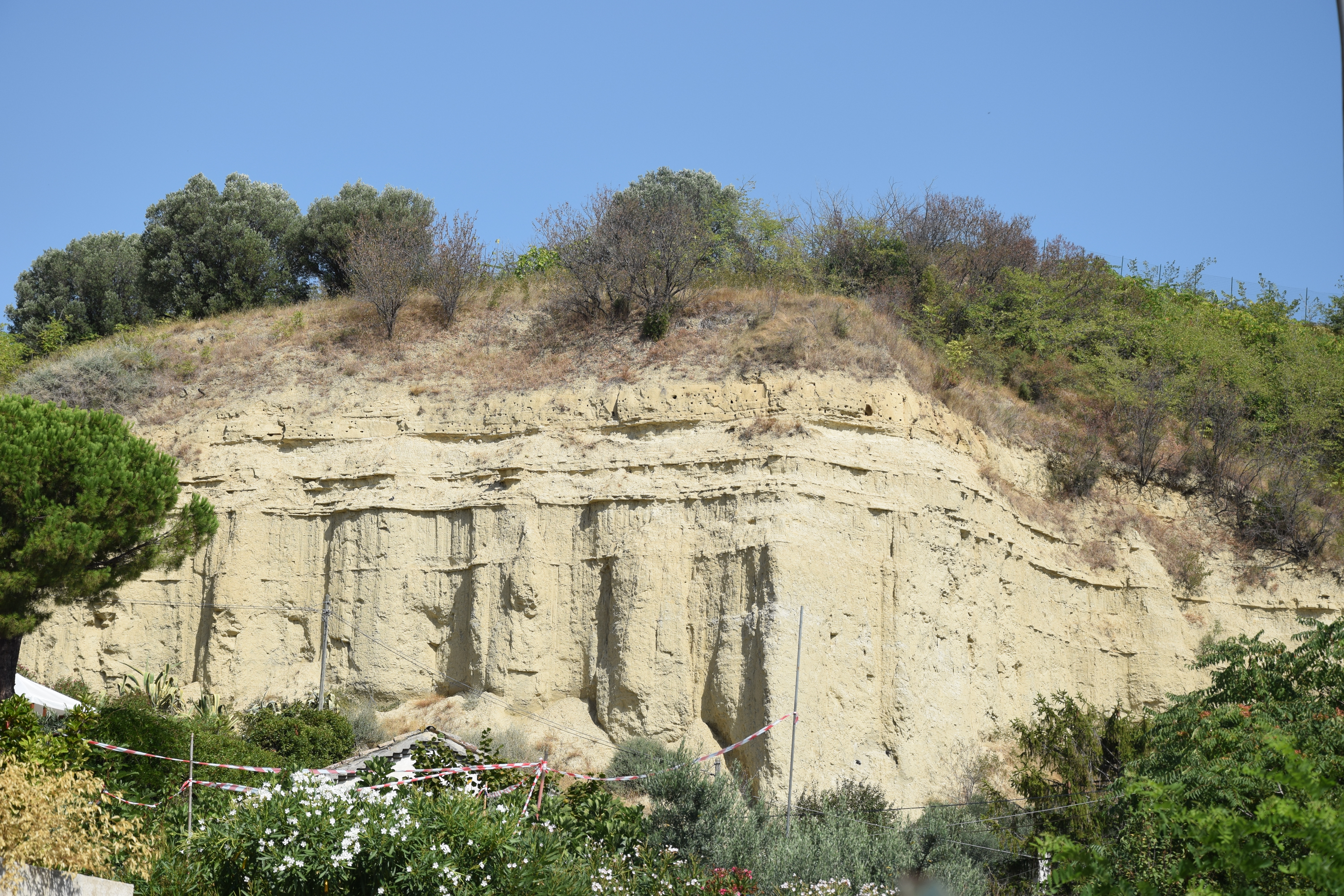 Colle del Telegrafo Pescara